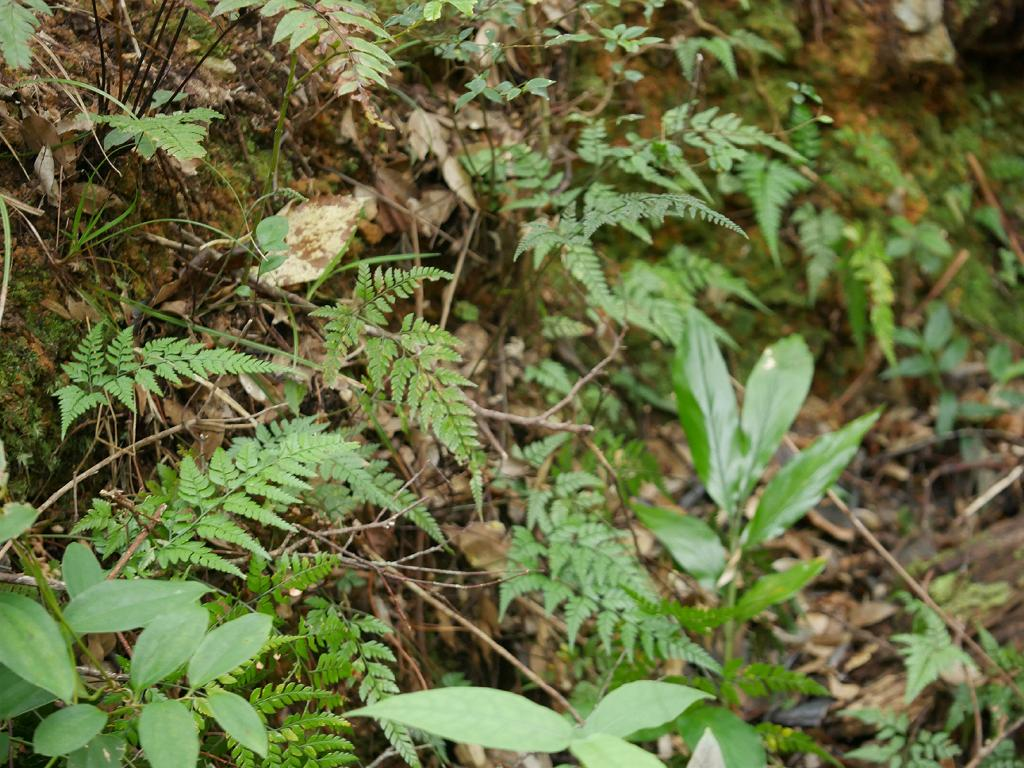 2018/12/30 沖縄本島：Okinawa Island, Japan